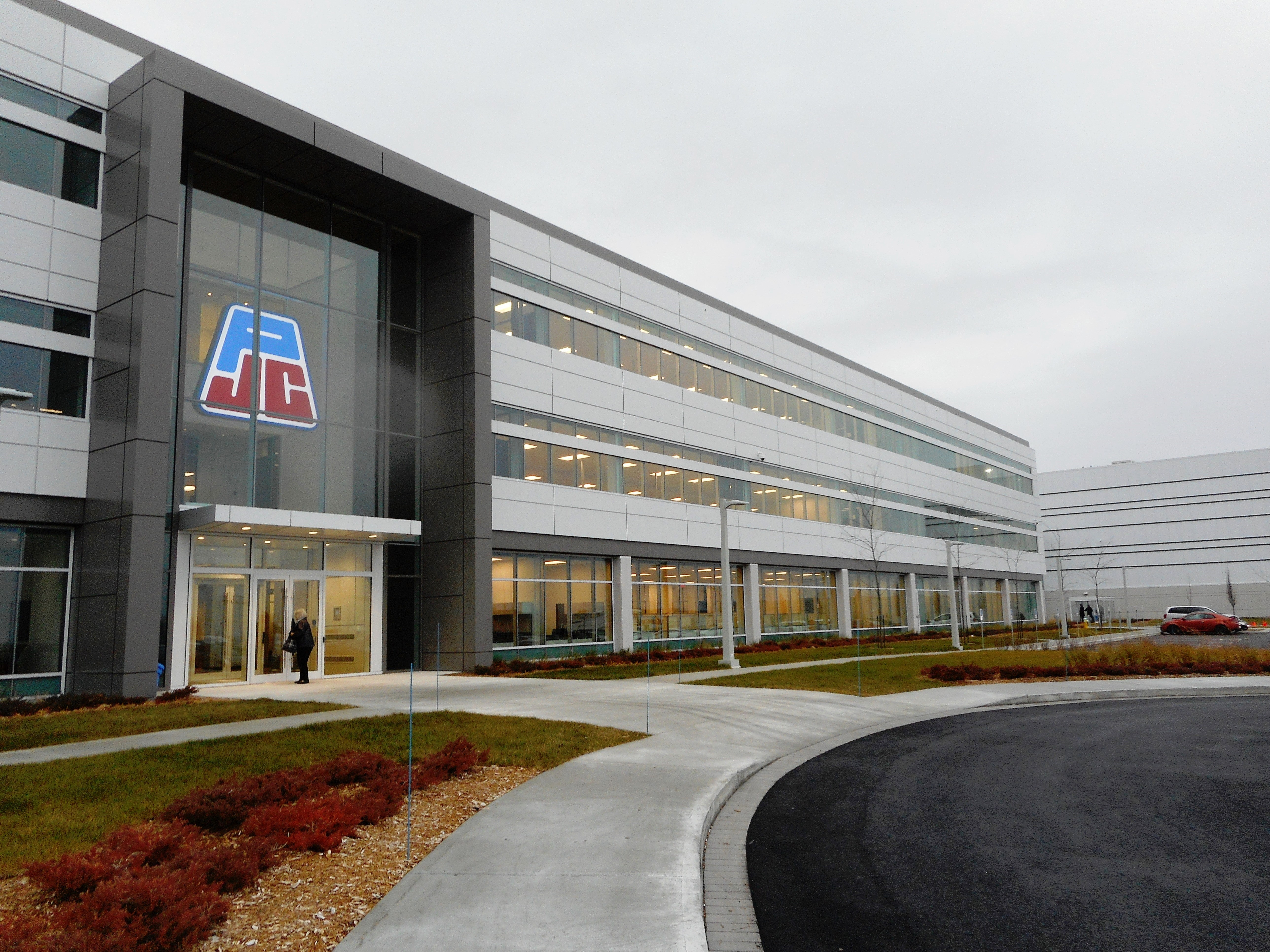 Groupe Jean Coutu, 245, rue Jean-Coutu, Varennes, Québec